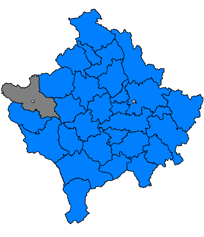 Pejë, Kosovë 2006